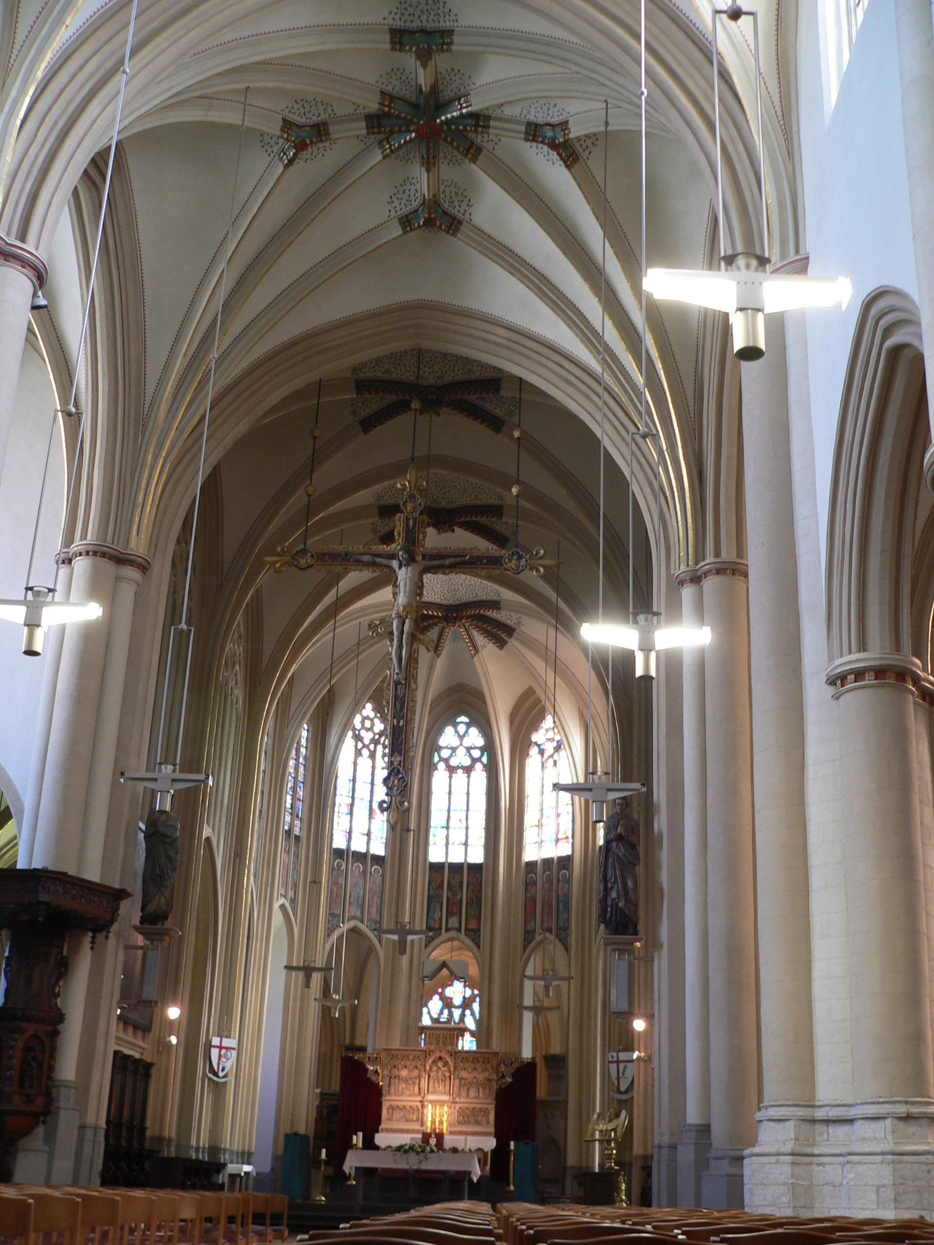 Chor in der Sint-Quintinus-Kathedrale in Hasselt - Belgien